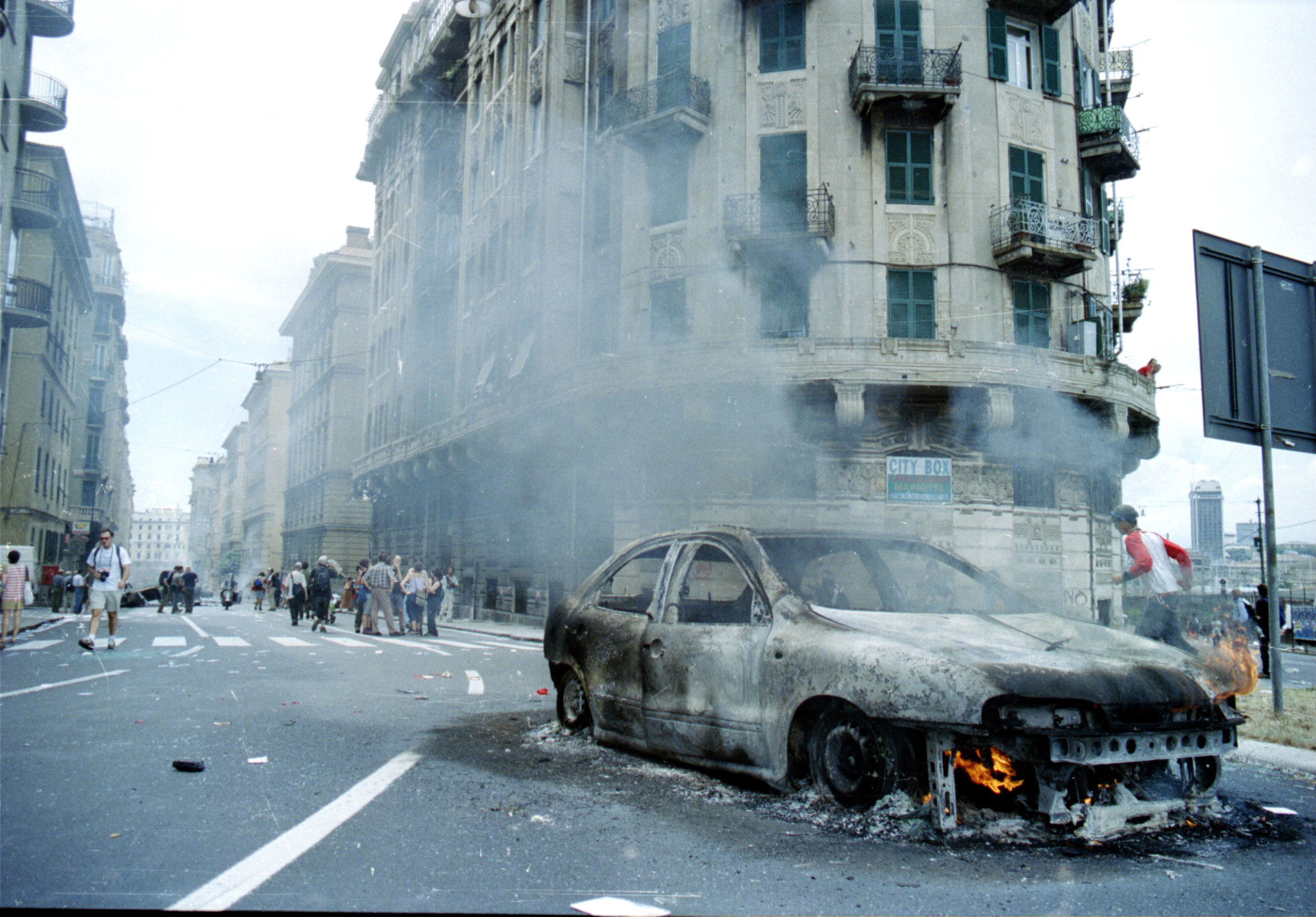 Genova - Fatti del G8 del 20 luglio 2001 Auto incendiata alla confluenza fra le vie Montevideo e Tolemaide